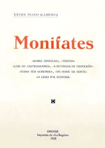 Monifates «Almas sinxelas» «Tratos» «Luis de Castromouro» «A retirada de Napoleón» «Todo tén goberno» «Un home de sorte» «O cego d'a Xestosa»